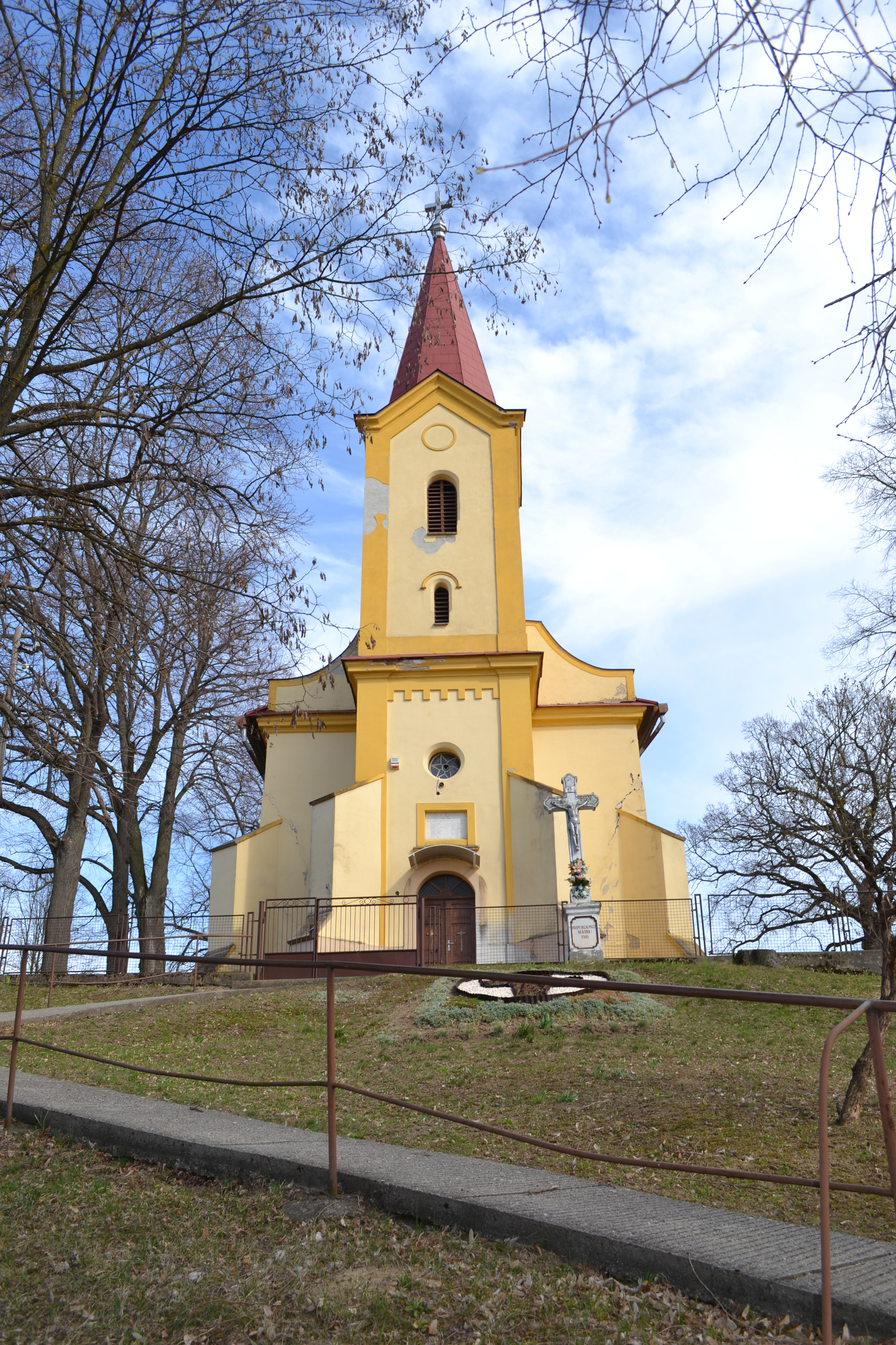 Rímskokatolícky kostol Navštívenia Panny Márie v Husinej